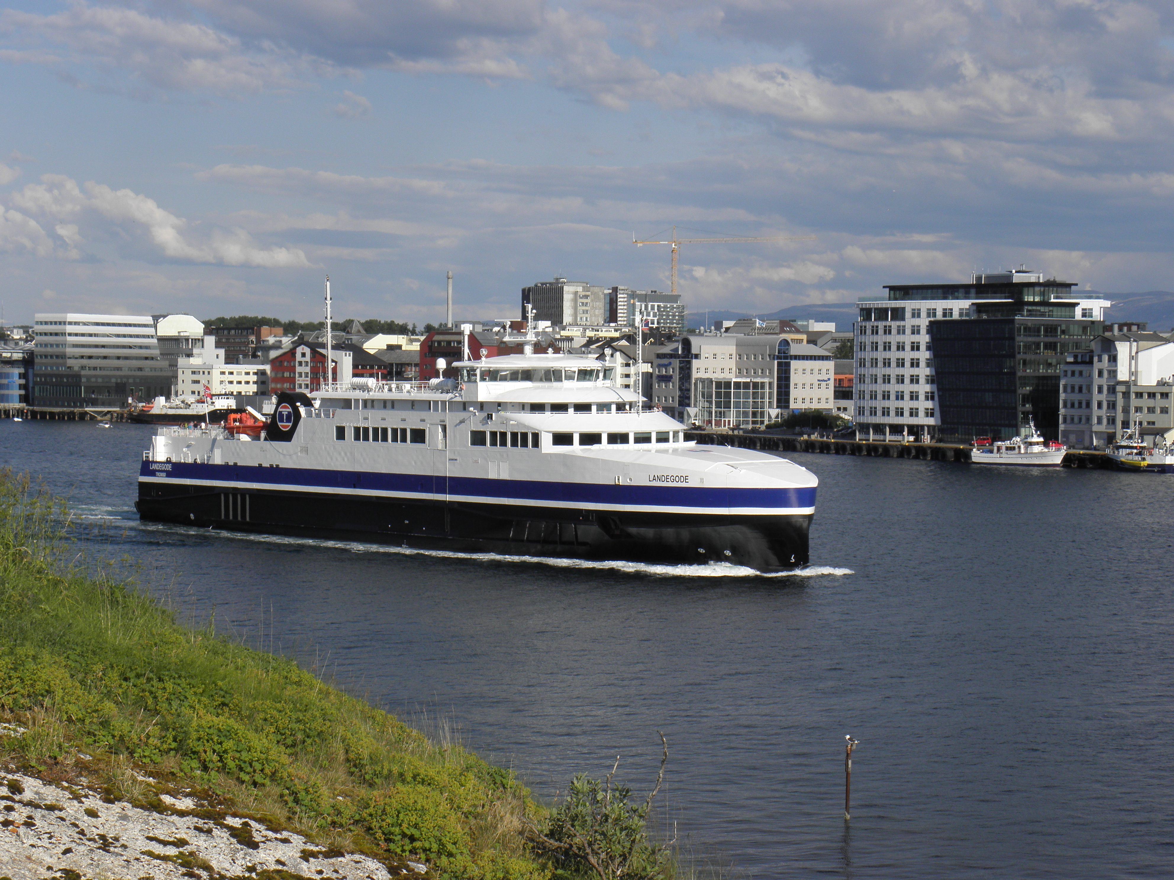 MF «Landegode» utanfor Bodø.